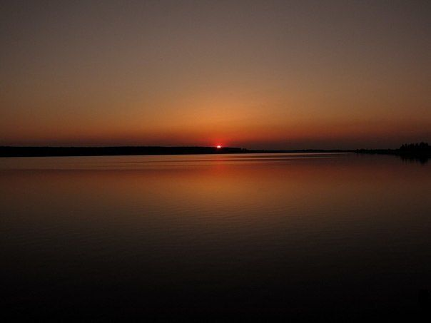 Черемошне, Городнянський район, с. Хотівля, м. Городня